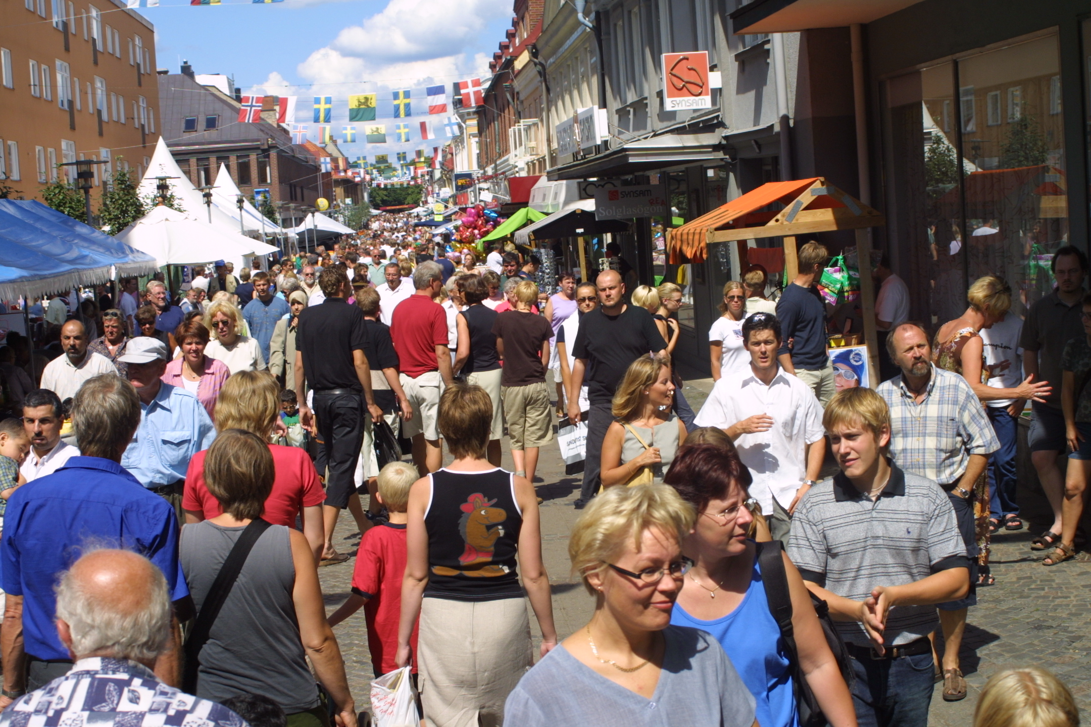 Drottninggatan i Karlshamn under Östersjöfestivalen (2001-07-21)